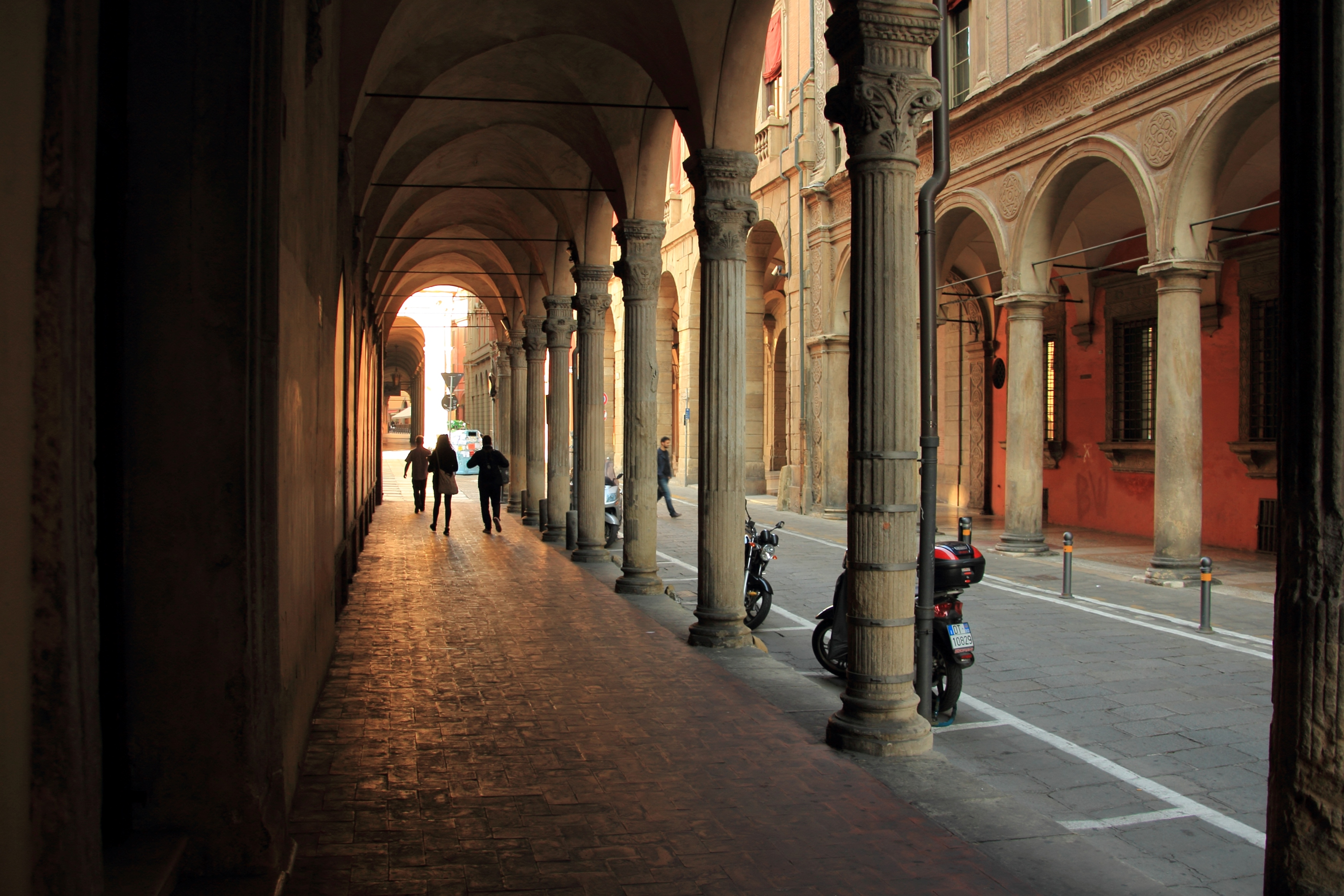 Portici (esclusi San Luca e Alemanni) This is a photo of a monument which is part of cultural heritage of Italy.